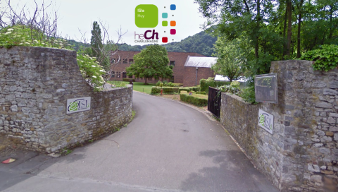 rue Saint Victor 3 à 4500 HUY